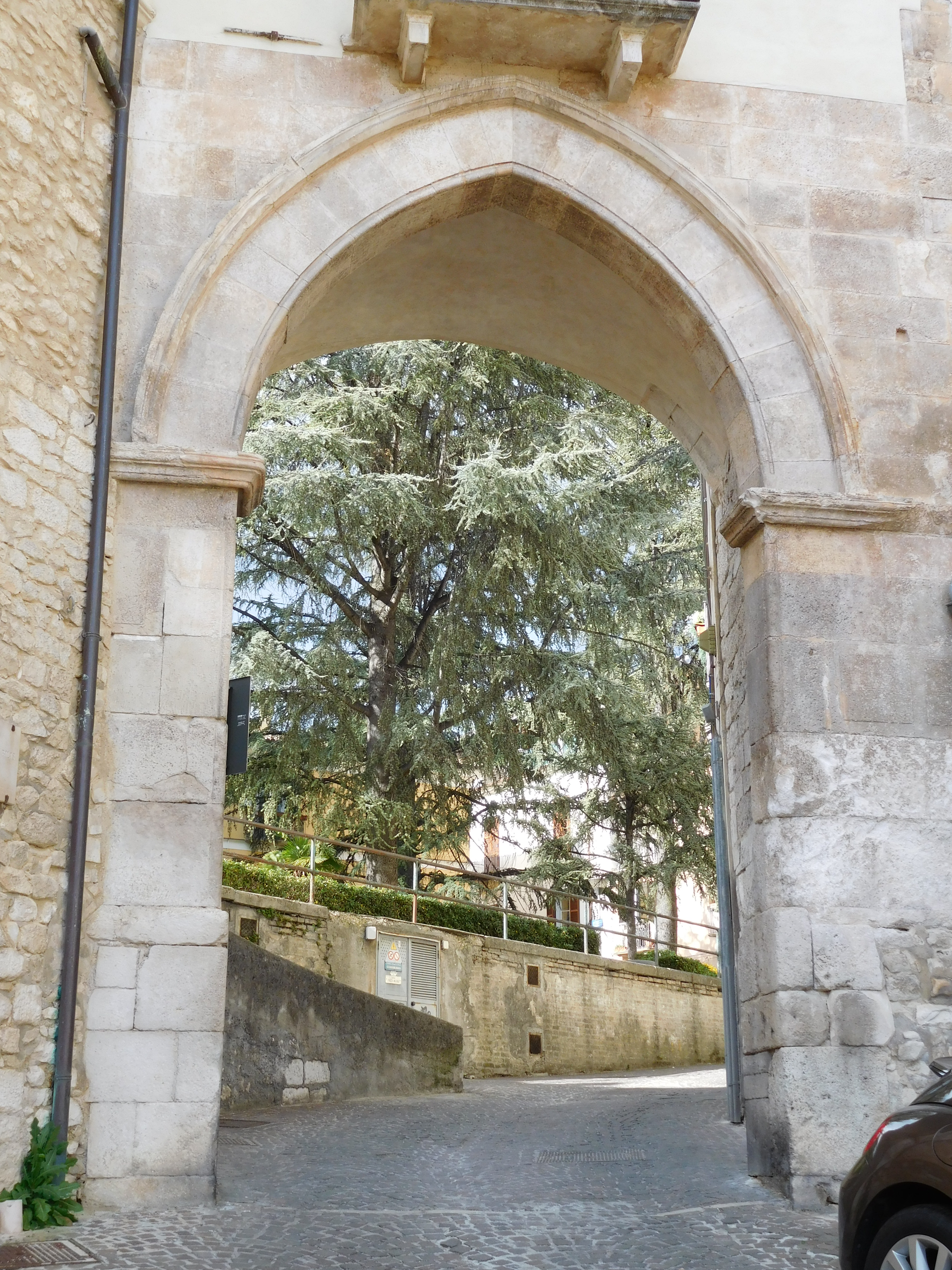 Porta cittadina a Sulmona